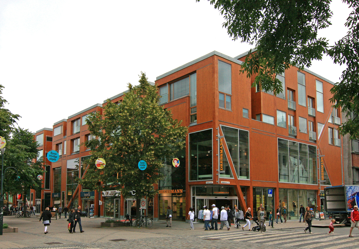 Borkeplassen, Dronningens gate 14, Trondheim. Oppført i massivtre / limtre med etasjeskiller i betong.